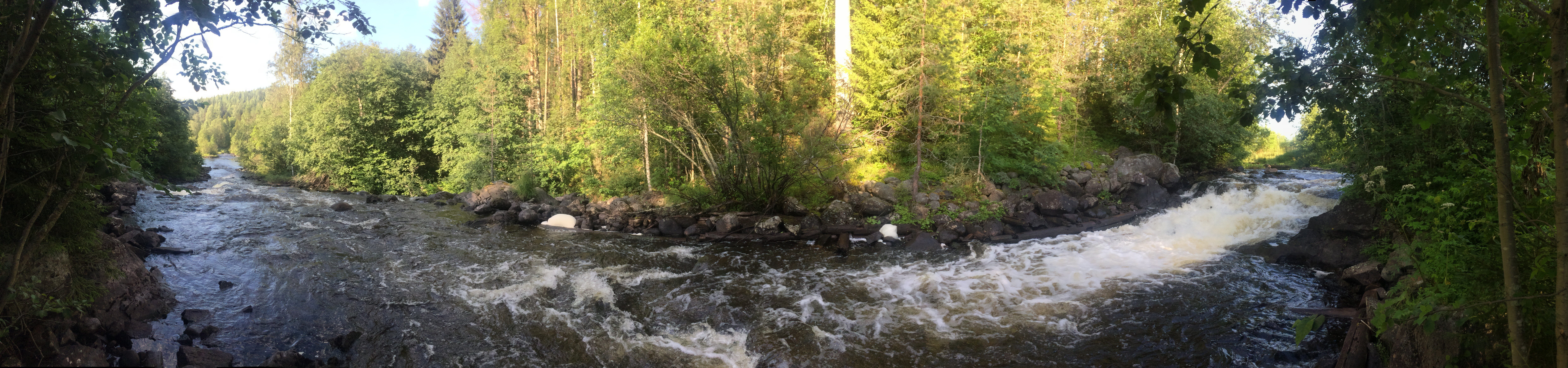 Остёр (приток Кумсы)